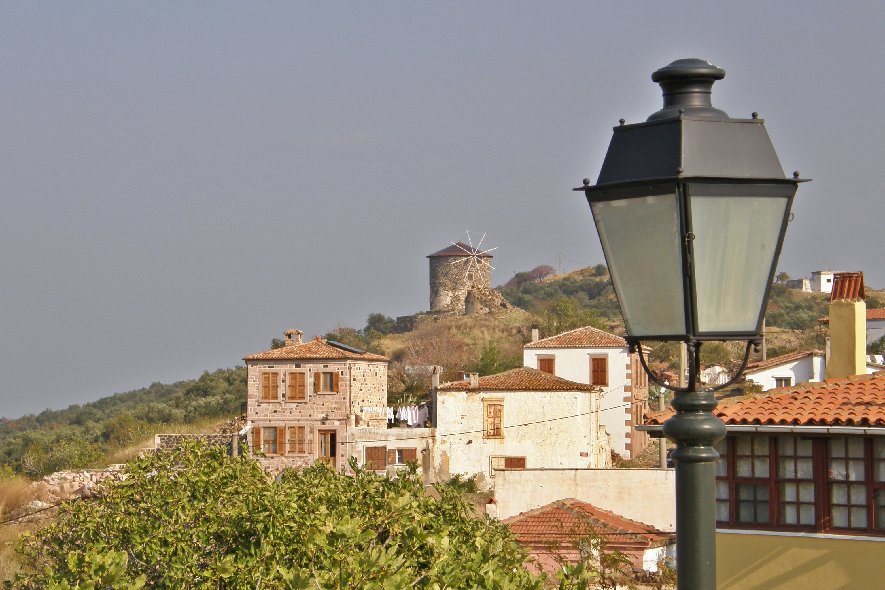 Vue d'un ancien moulin sur les hauteurs de l'ile d'Alibey, province de Balıkesir, région de Marmara, Turquie.